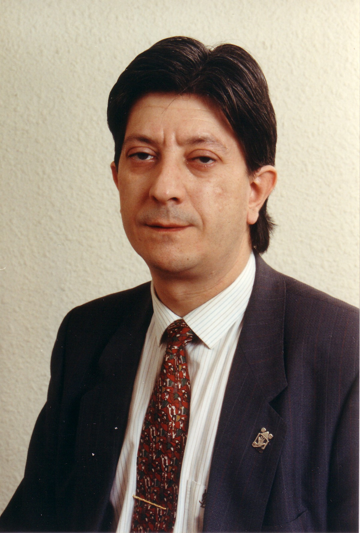 Luis Pastrana Giménez